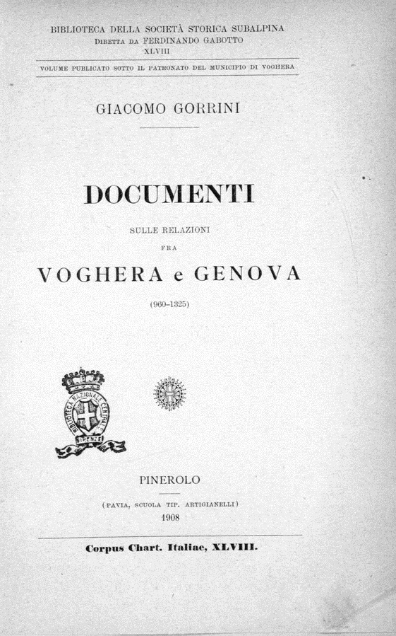 Frontespizio